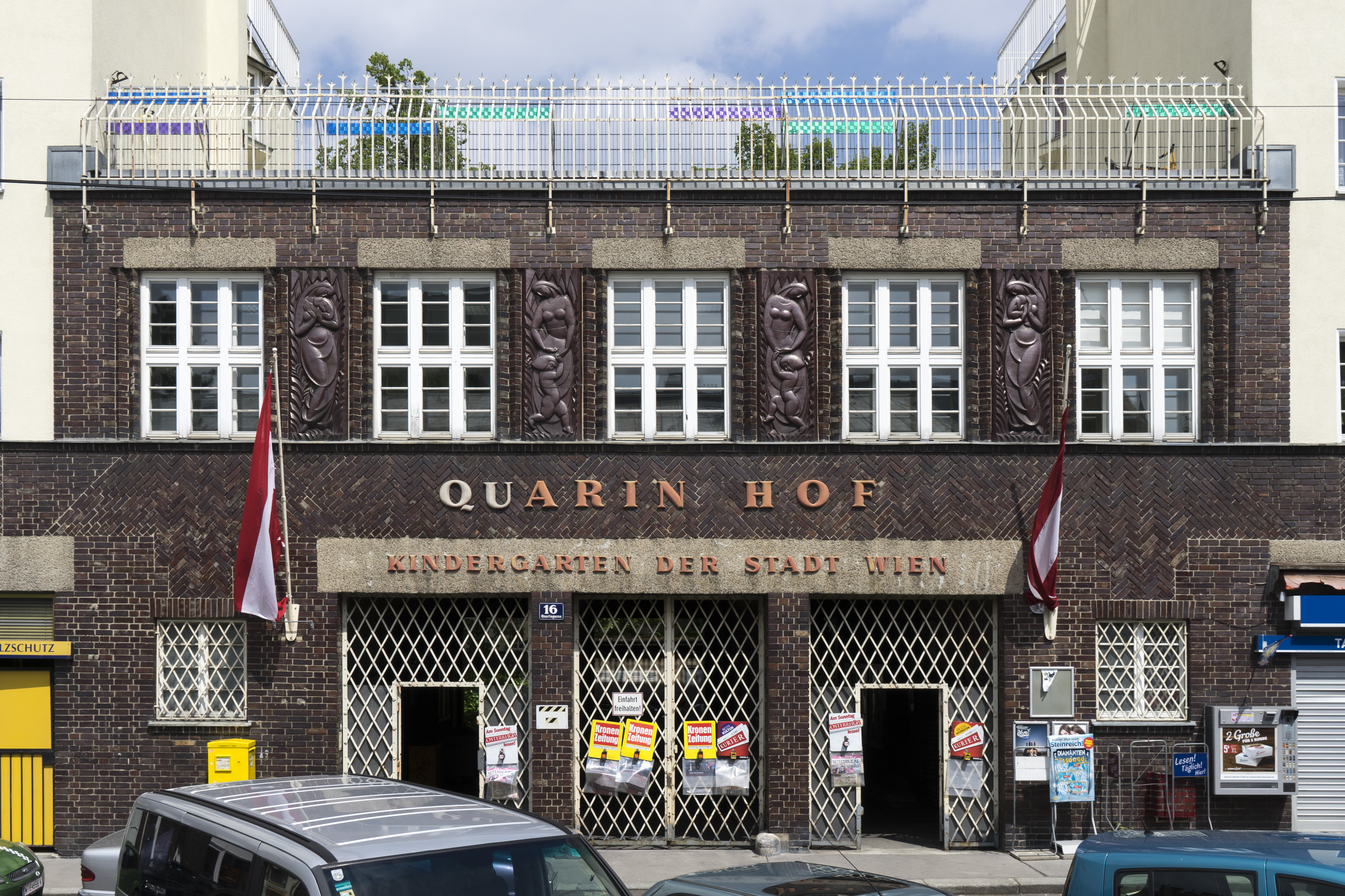 Der Quarinhof in Wien ist ein Gemeindebau der Zwischenkriegszeit. Er fällt besonders durch braune Glasurziegel von Othmar Schimkowitz auf